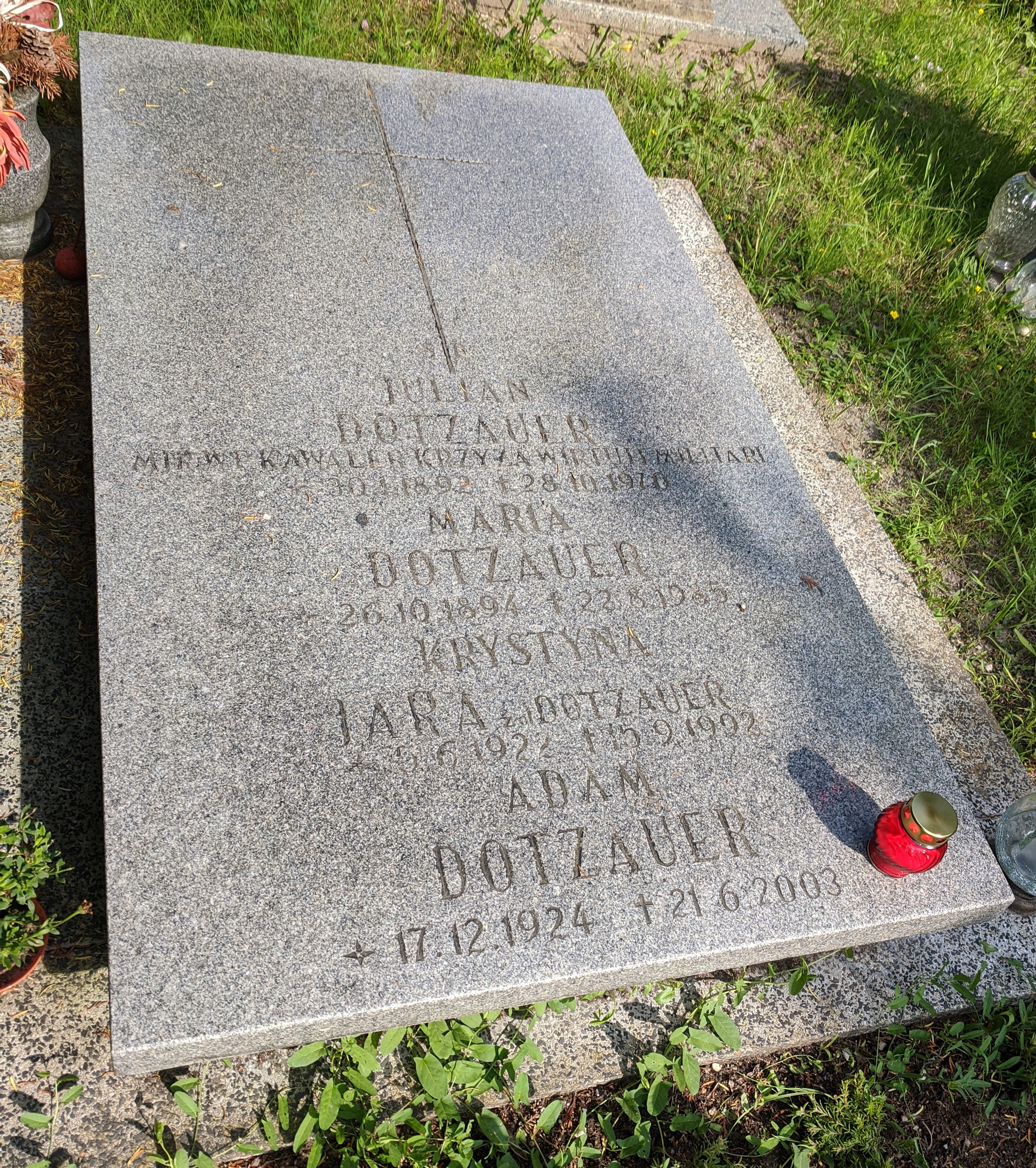 Grób Adama Dotzauera, jego siostry Krystyny i ich rodziców - Juliana i Marii. Cmentarz Grabiszyński we Wrocławiu, pole/grób/rząd: 20/1121/29.